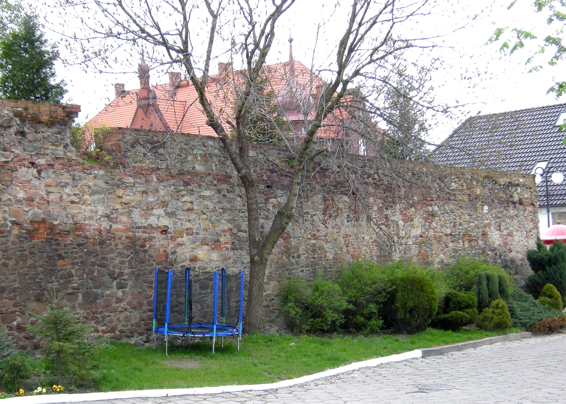 Otmuchów, ul Cicha, fragmenty murów obronnych, koniec XV w.